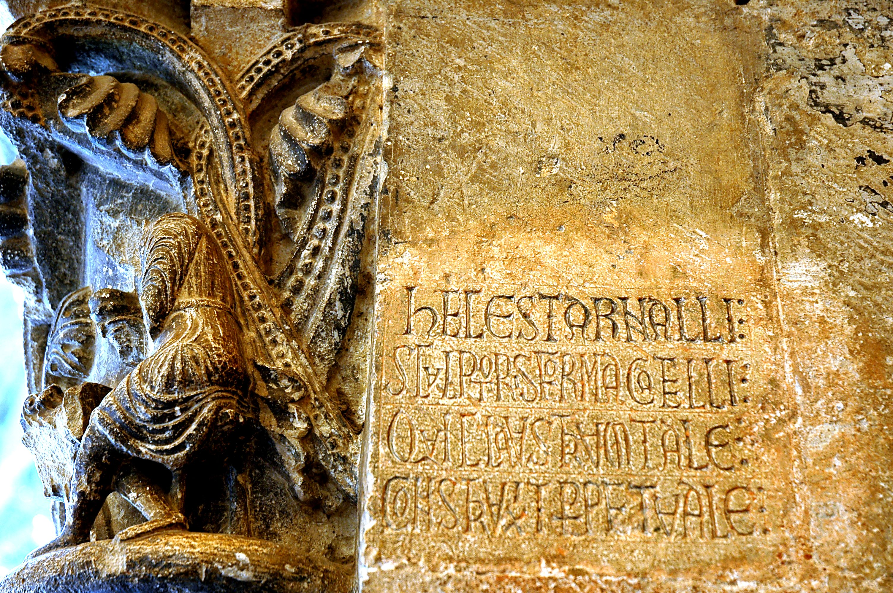 Monestir de Sant Cugat - Inscripció d'Arnau Cadell